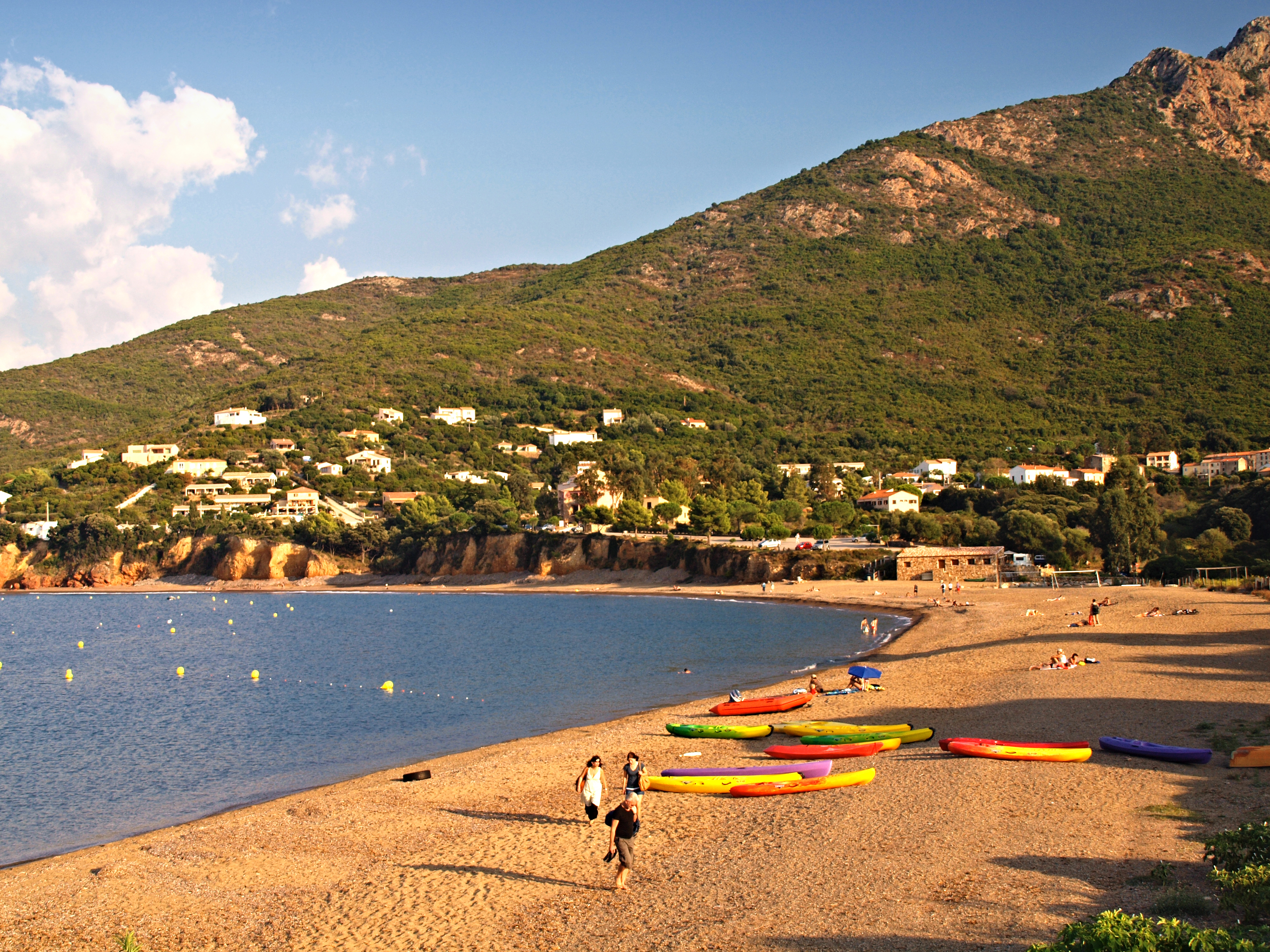 Galeria - plage de la marine